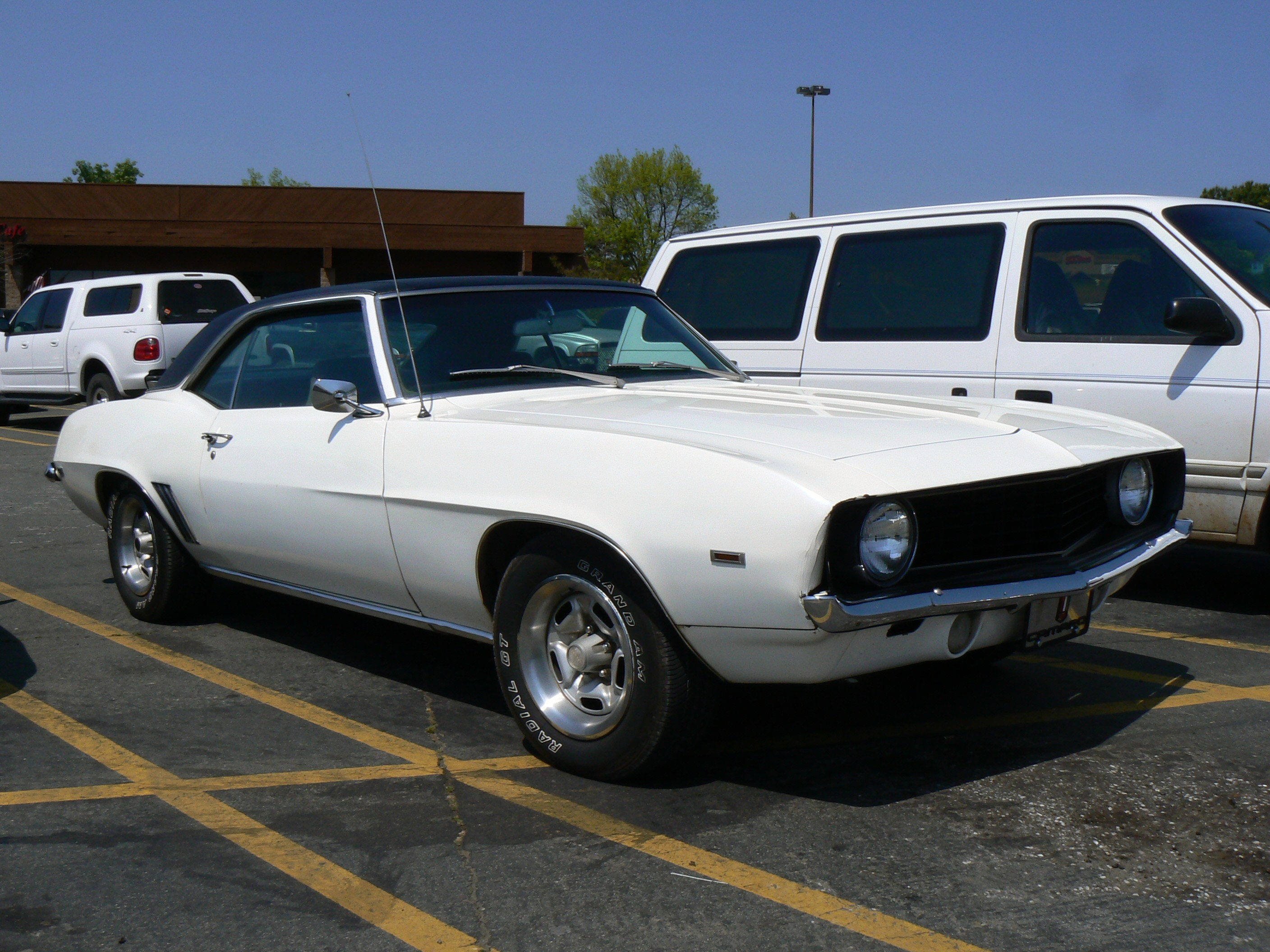 1969 Camaro